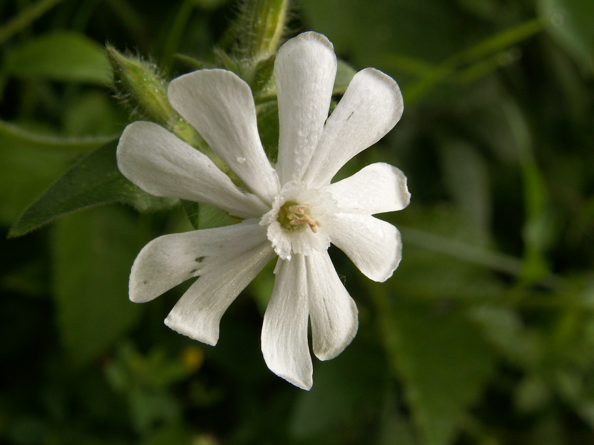 Silene latifolia (syn. Silene alba) NRM